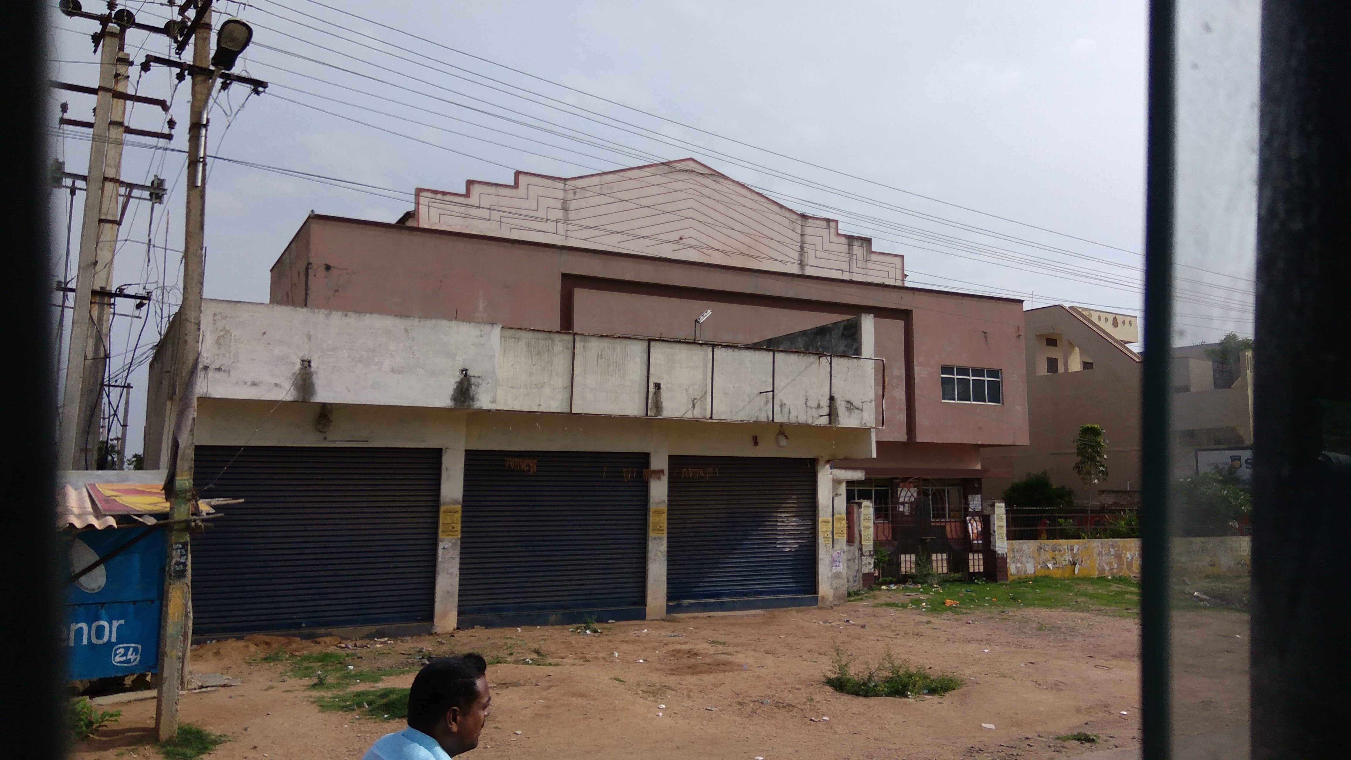 జనగాంలోని సినిమా హాల్